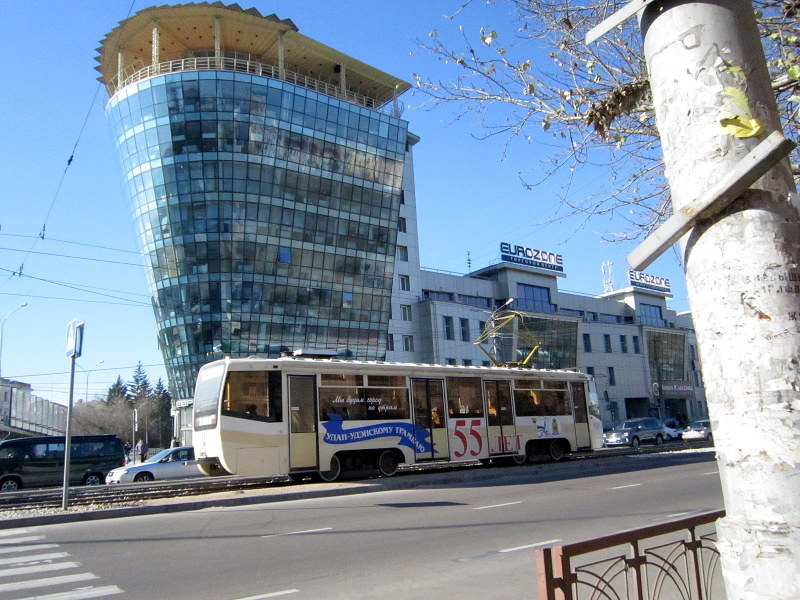 Трамвай. Улан-Удэ. Ул. Балтахинова.